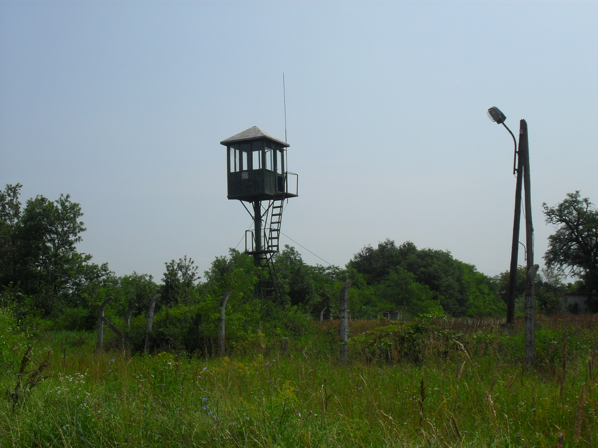 Nagyoroszi - katonai terület a község határában